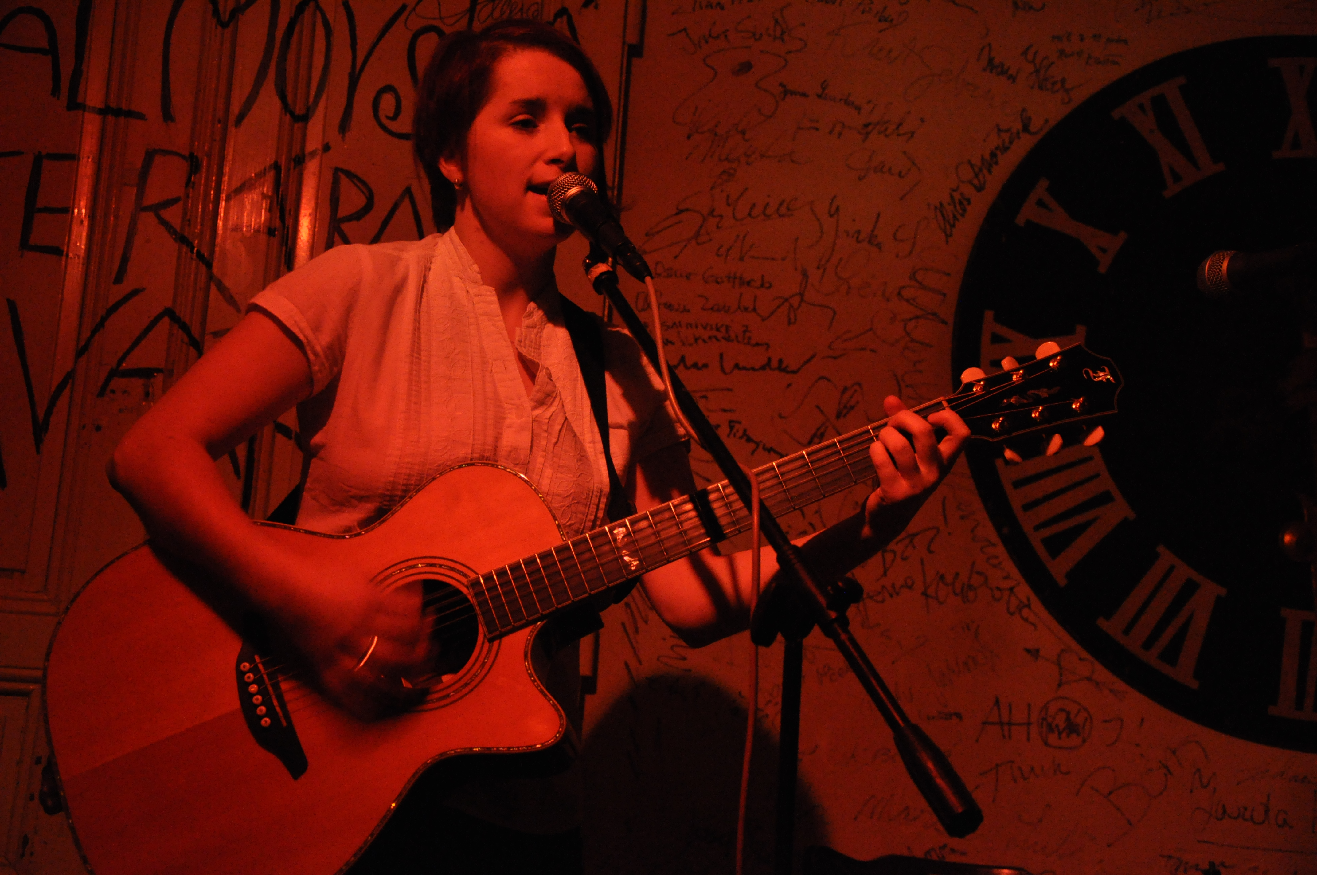 Lucie Redlová na koncertě v pražské Salmovské literární kavárně 8. února 2010